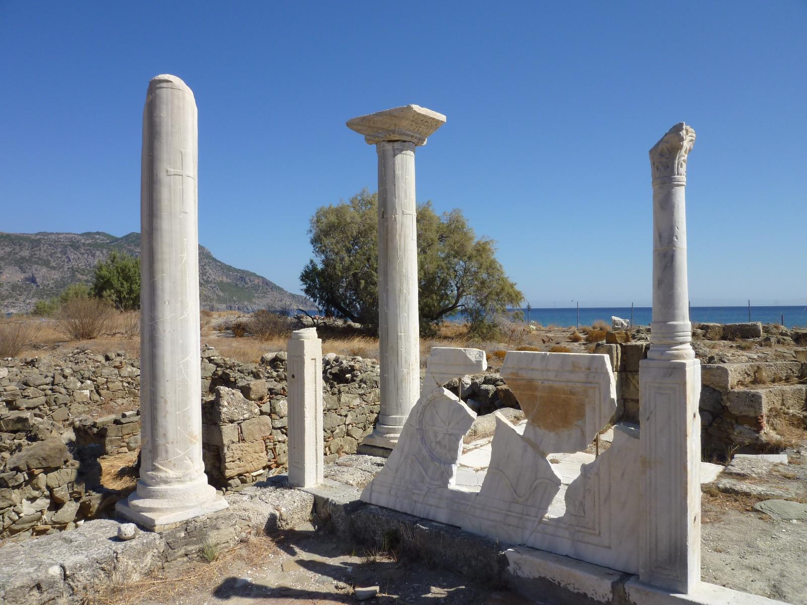 Die Reste der Basilika Agios Fotini liegen am Stadtrand von Pigadia; an der Hauptstraße und am langgezogenen Stadtstrand.